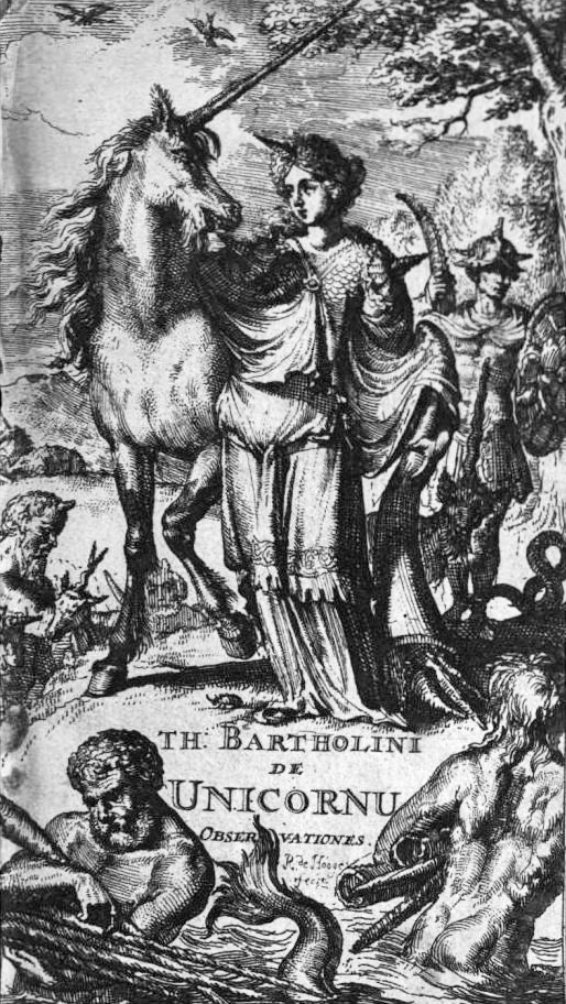 Frontispice de l'ouvrage De unicornu observationes novae de Thomae Bartholini.